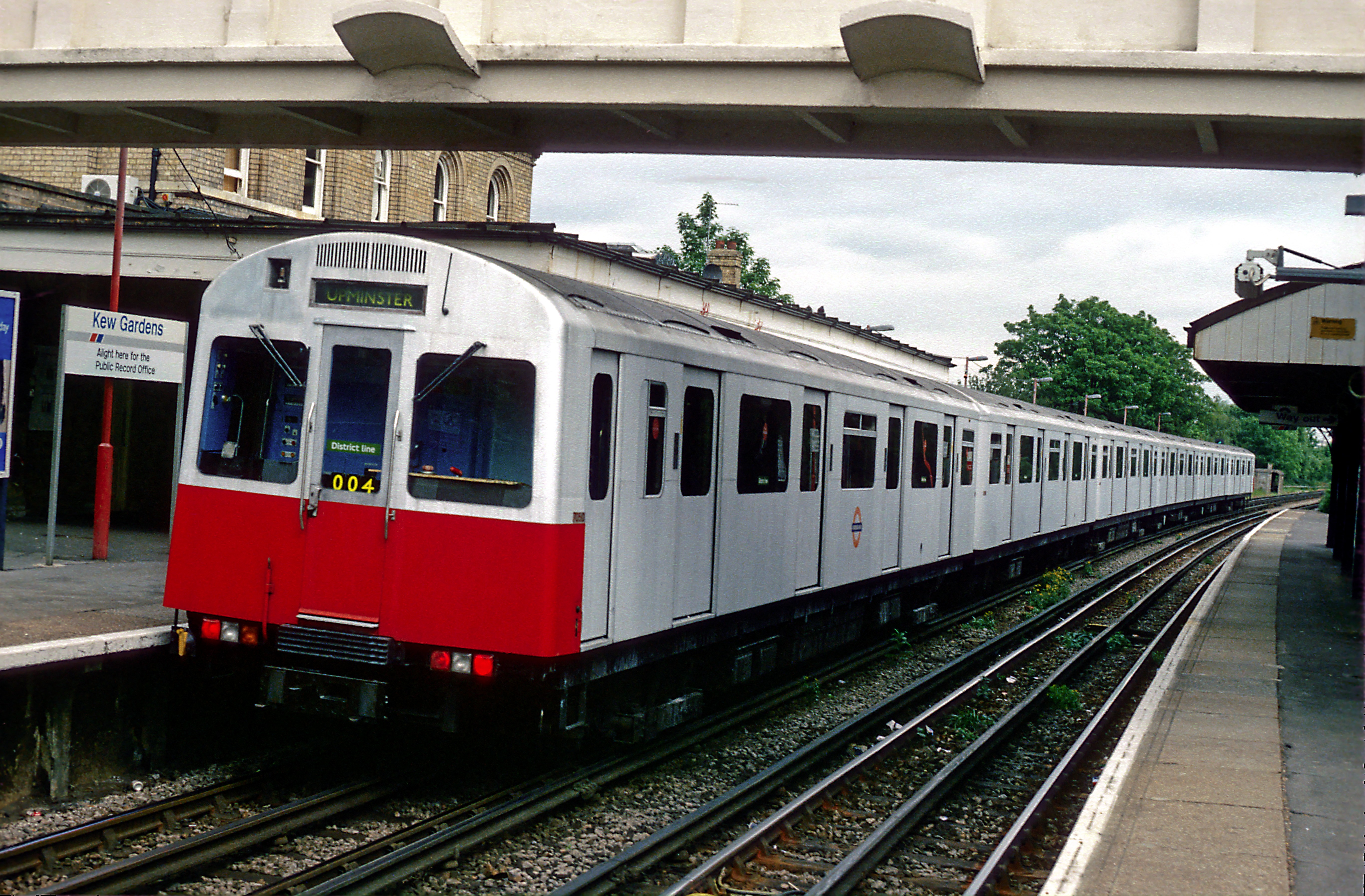 U-Bahn-Triebzug der Reihe D auf der District Line (Richmond–Upminster), Gemeinschaftsbetriebsstrecke mit der North London Line zwischen Richmond und Gunnersbury. Auf den Mischbetriebssstrecken ist die Rückleitungsschiene in Gleismitte mit den Fahrschienen verbunden.